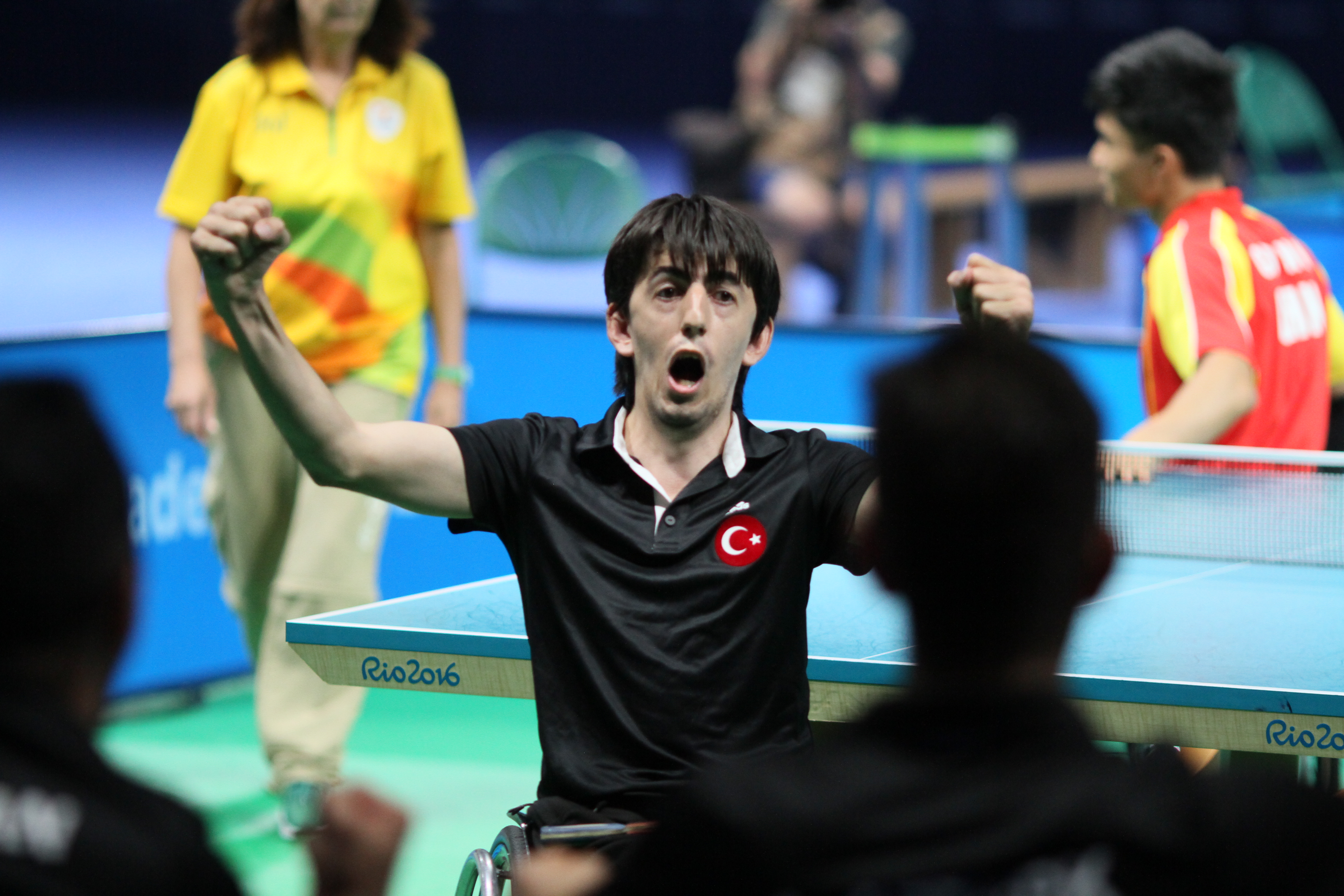 OZTURK Abdullah (TUR,M4) IMG_6011